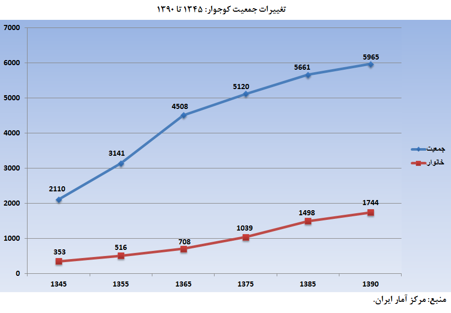 فایل شامل نموداری است که تغییرات جمعیت کوجووار را نشان می دهد